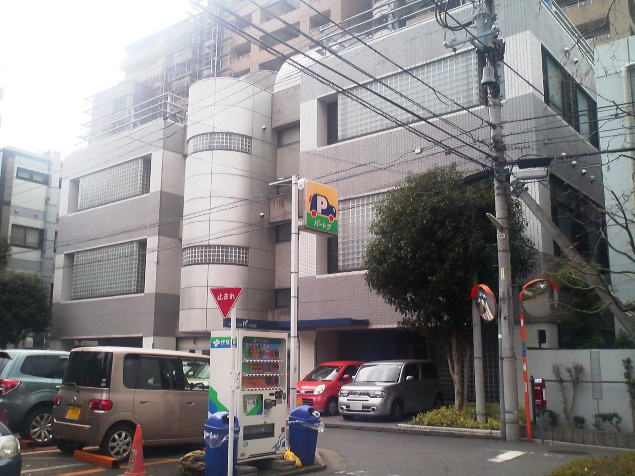 プロダクションI.Gスタジオを撮影